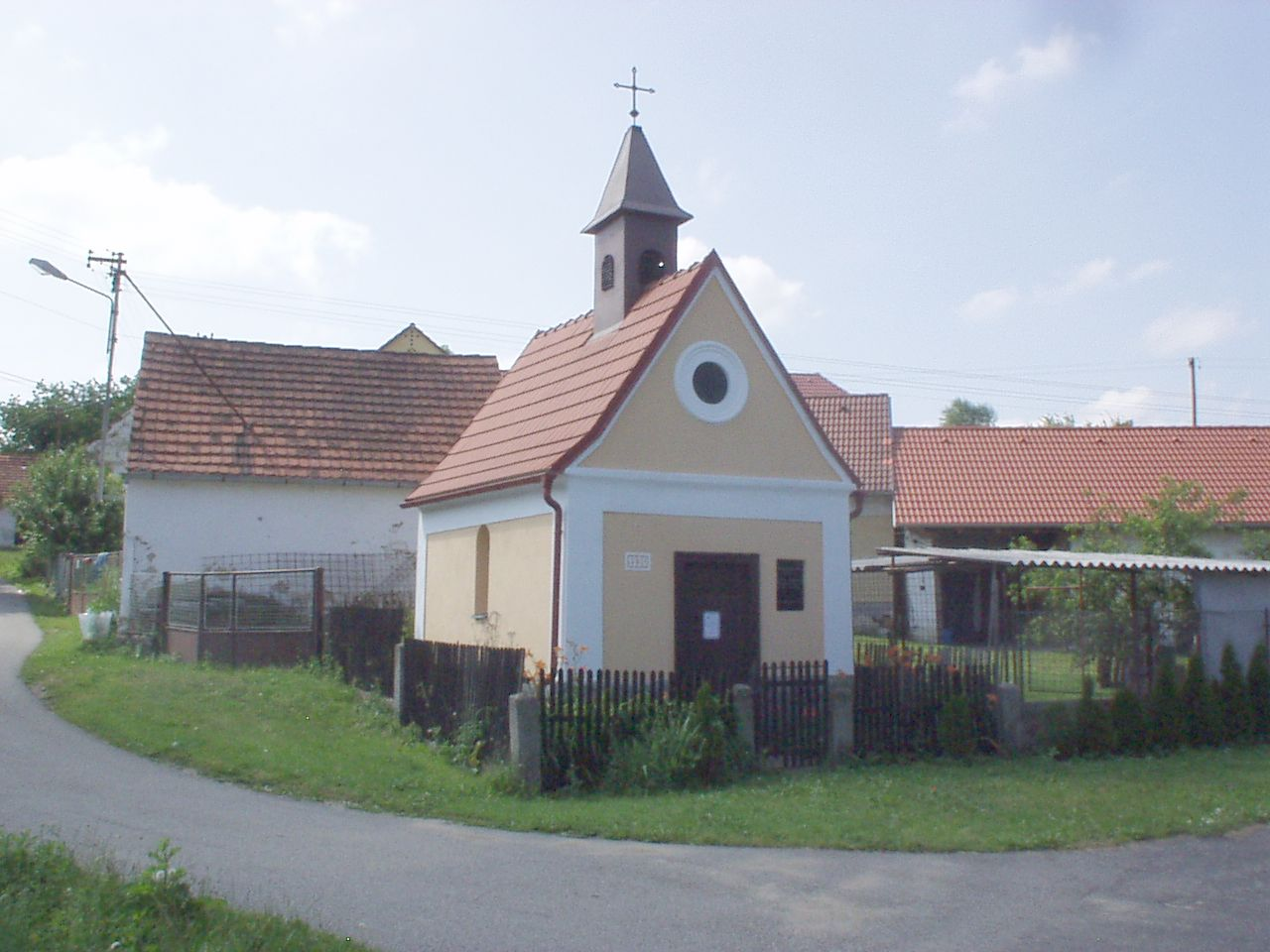 kaple v Bratronicích (okres Strakonice) z roku 1930 s pamětní deskou se jmény šesti bratronických občanů padlých v první světové válce